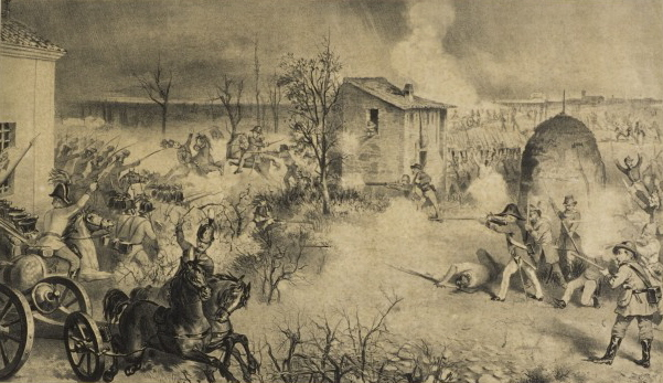 1831, combattimenti presso Rimini